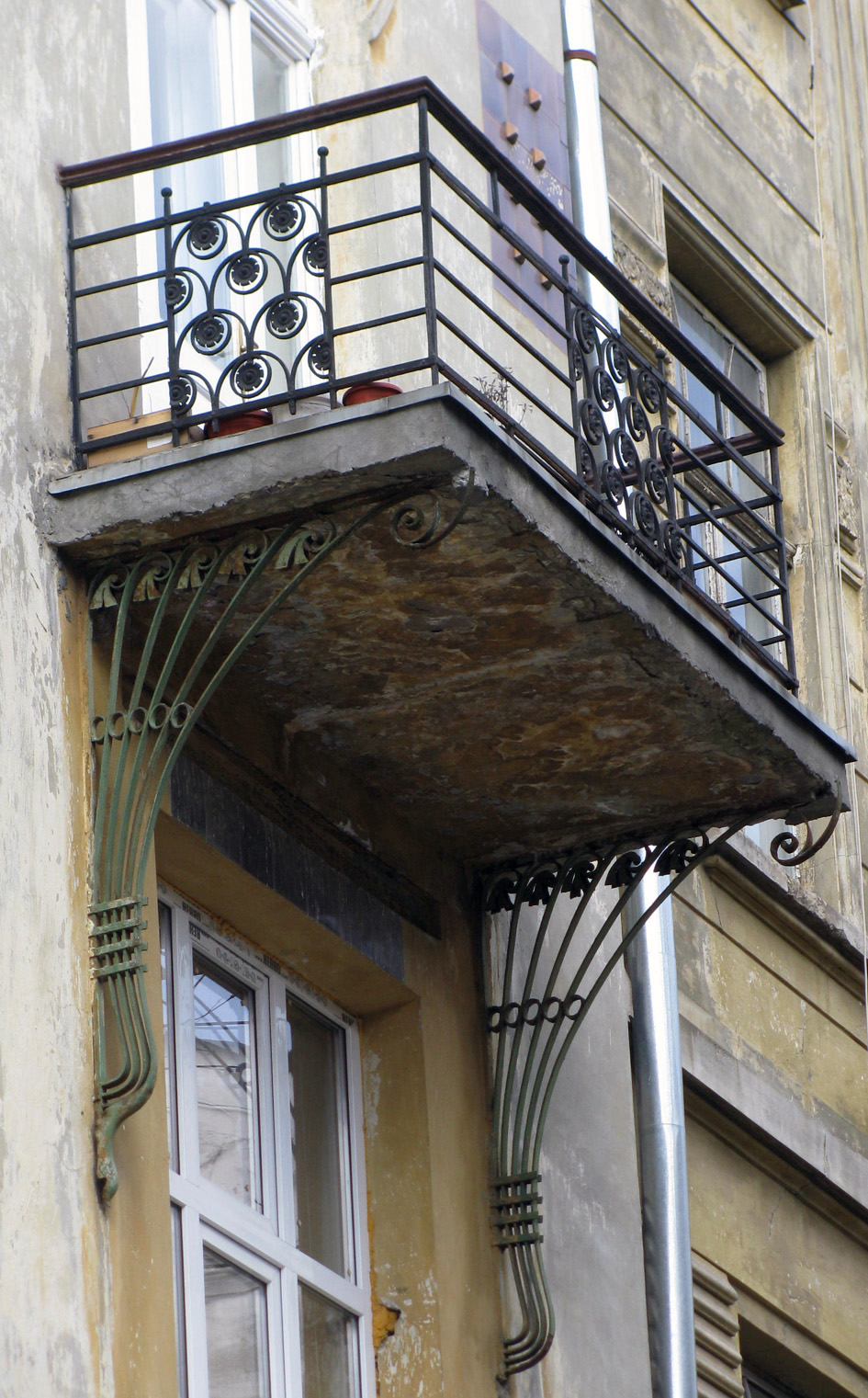 Балкон. Будинок по вулиці Богомольця, 3 (Львів). Запроектований архітектурно-будівничим бюро Івана Левинського.